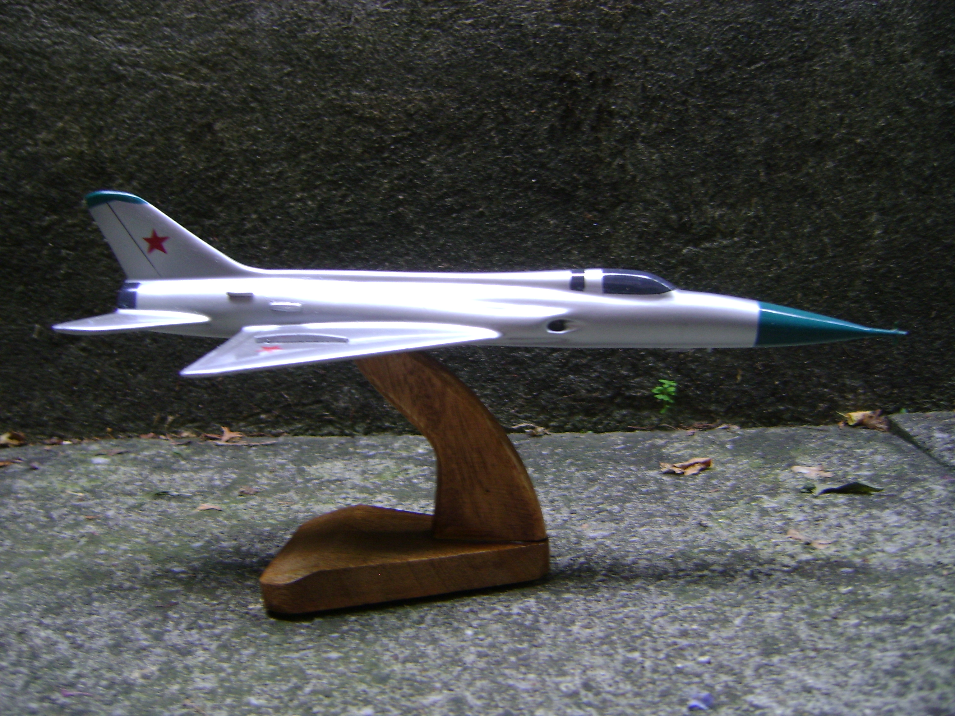 Sukhoi P-1